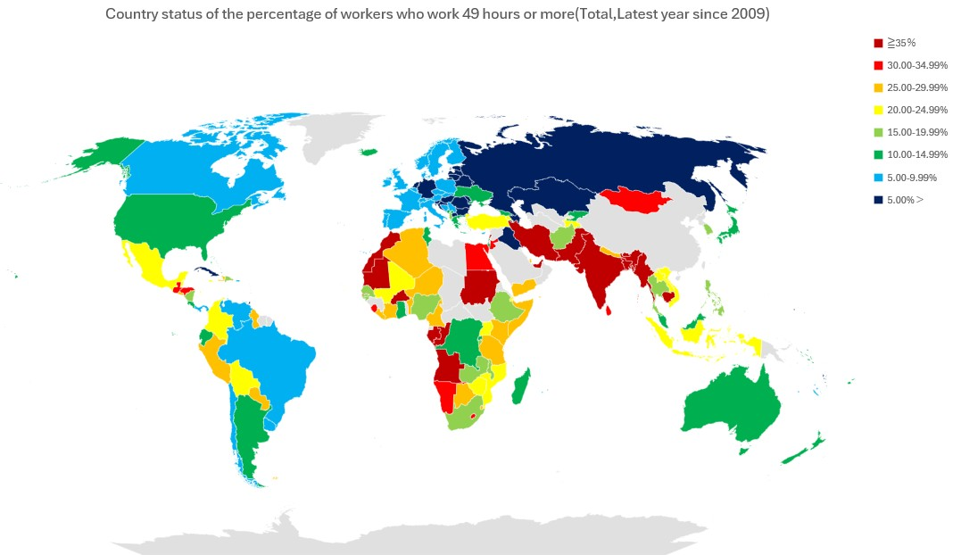 49時間以上労働者の割合の国別状況。パートタイムや自営業も含む。